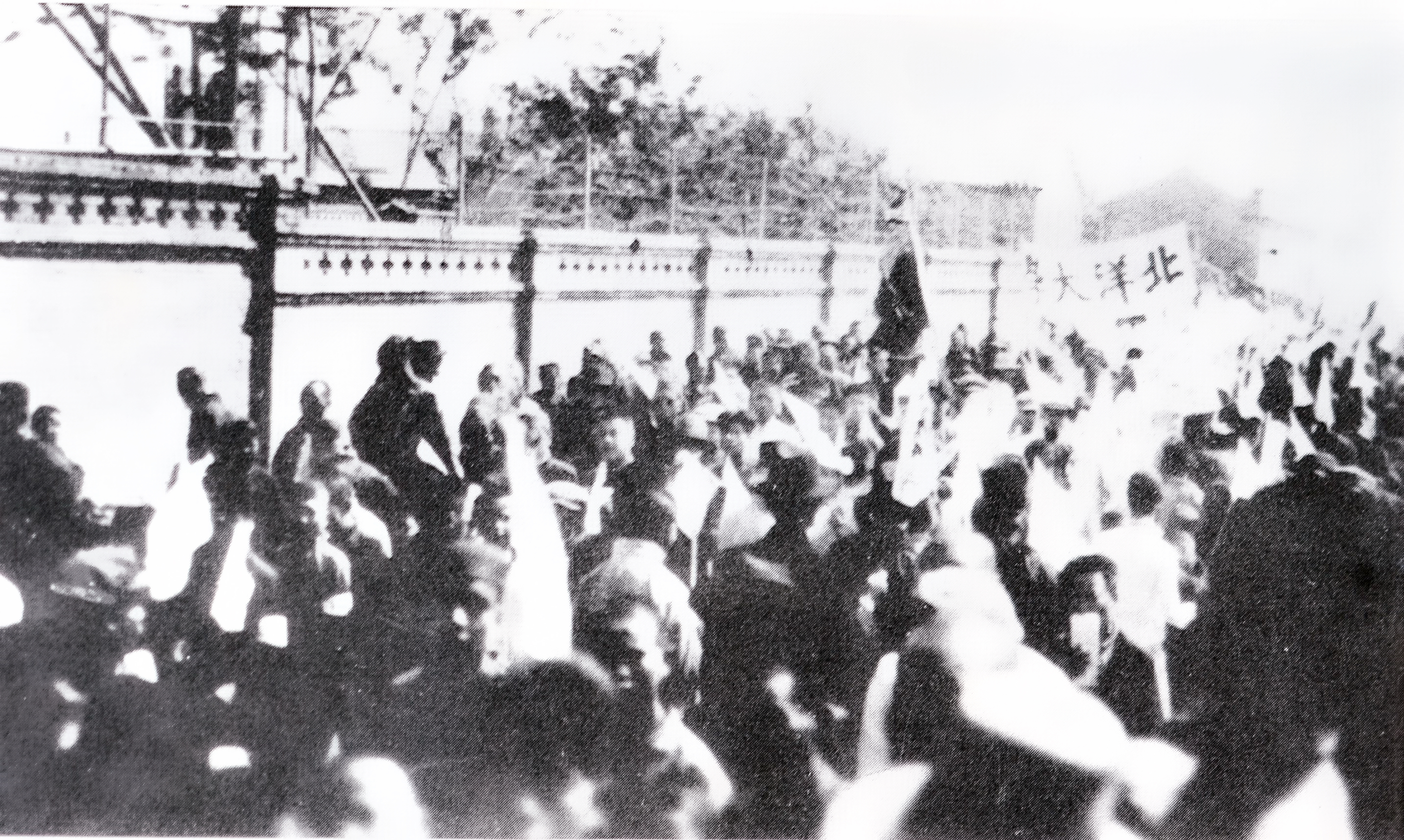 Peiyang University in 1919